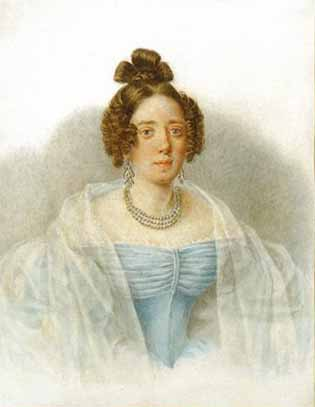 Мария Николаевна Коновницына, ур.Бахметева (18?-1888), жена Ивана Петровича Коновницына (1806-1867).